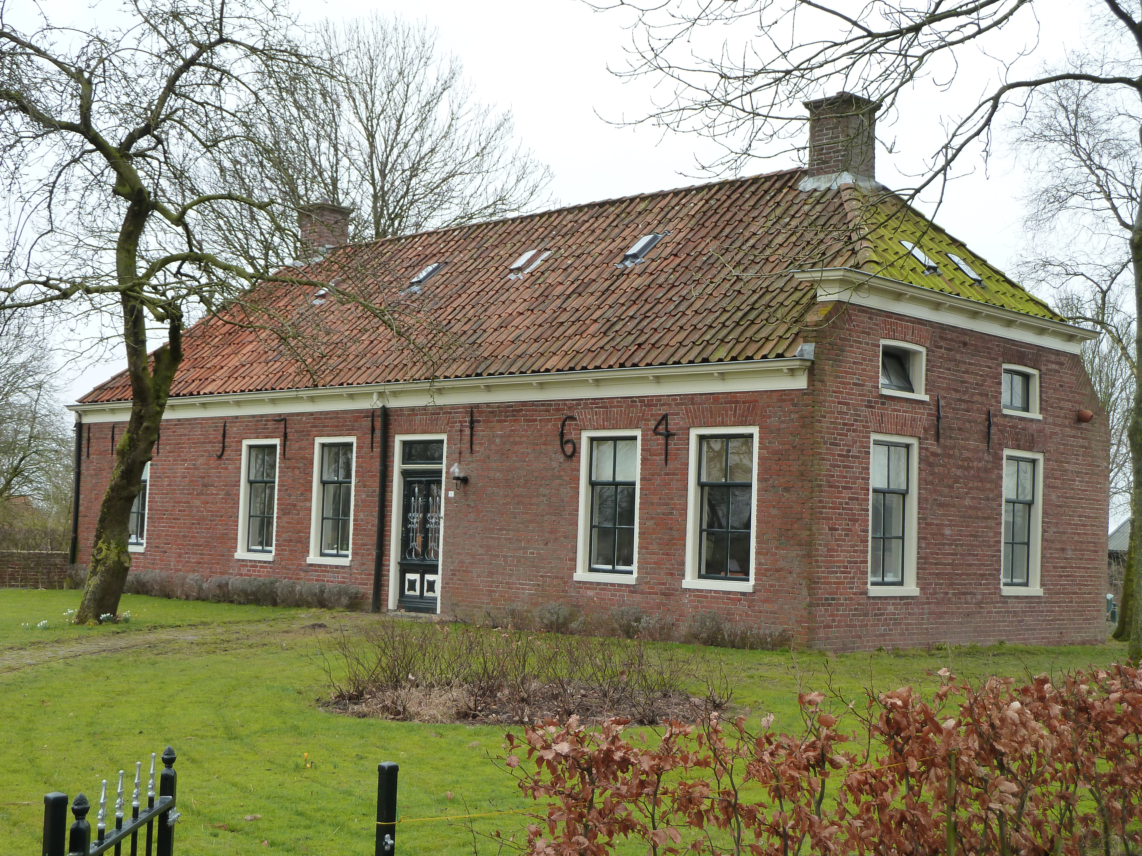 Oude kosterij in Krewerd